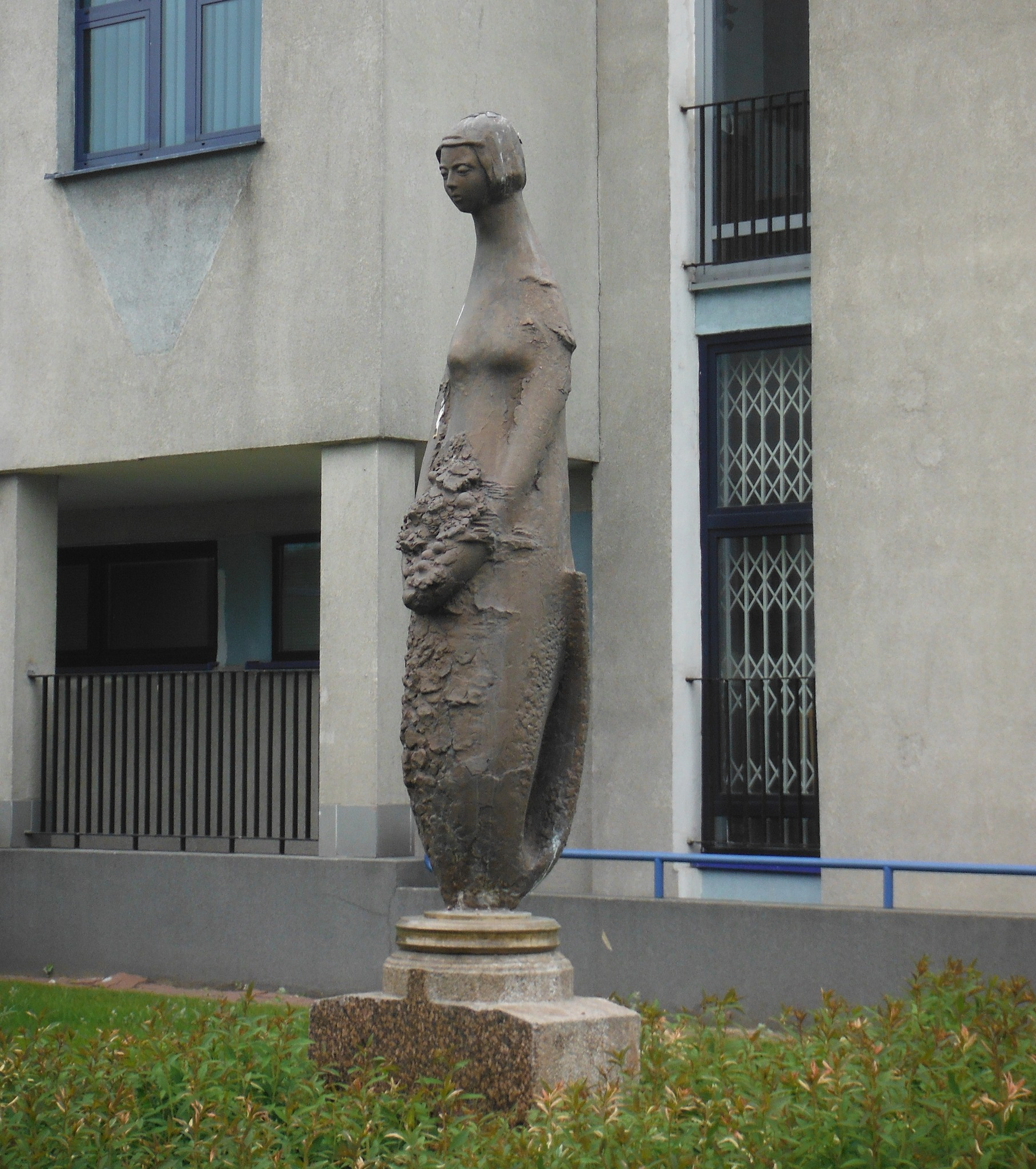 Syrenka autorstwa Jerzego Chojnackiego znajdująca się pierwotnie przed Kinem Sawa na Saskiej Kępie. Obecnie przed gmachem urzędu dzielnicy na ul. Grochowskiej w Warszawie.